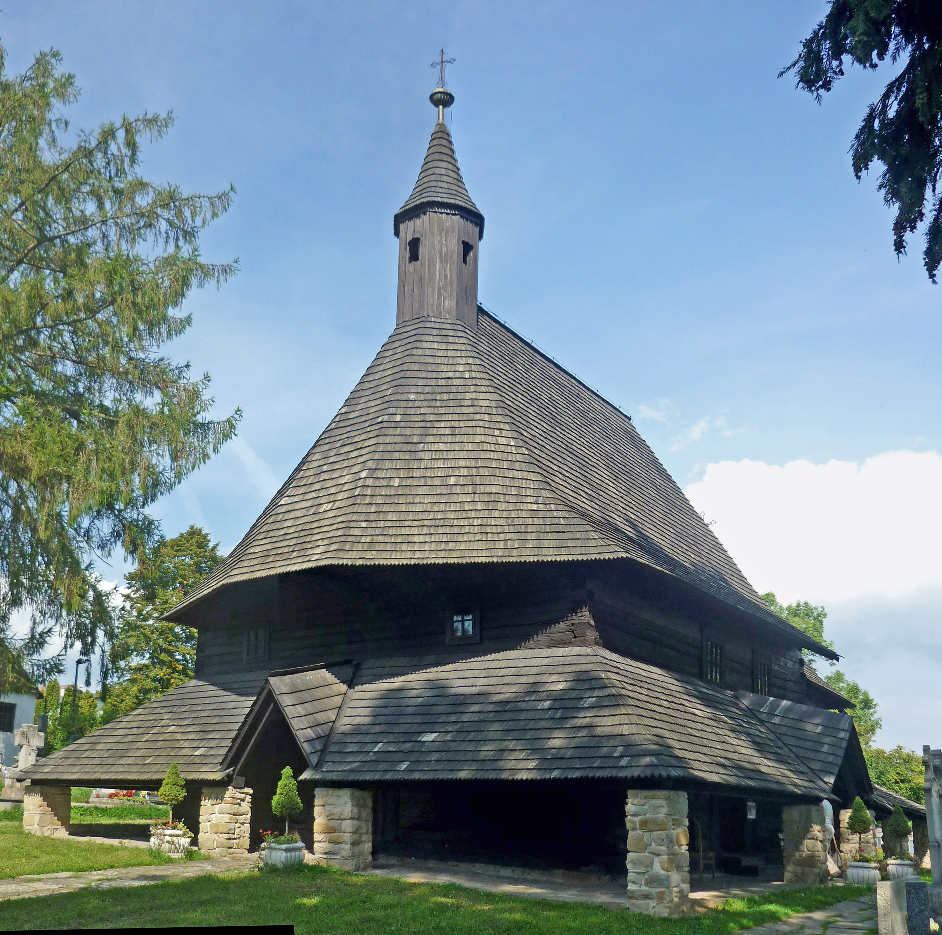 Allerheiligenkirche auf dem Friedhof in Tvrdošín (Turdoschin) in der Slowakei. Älteste Holzkirche (urspr. gotisch vom Anfang des 15. Jhdts.), jetzt Renaissancebau von 1650 bis 1654 mit Barock-Altar vom Ende des 17. Jhdts. / Anfang des 18. Jhdts.